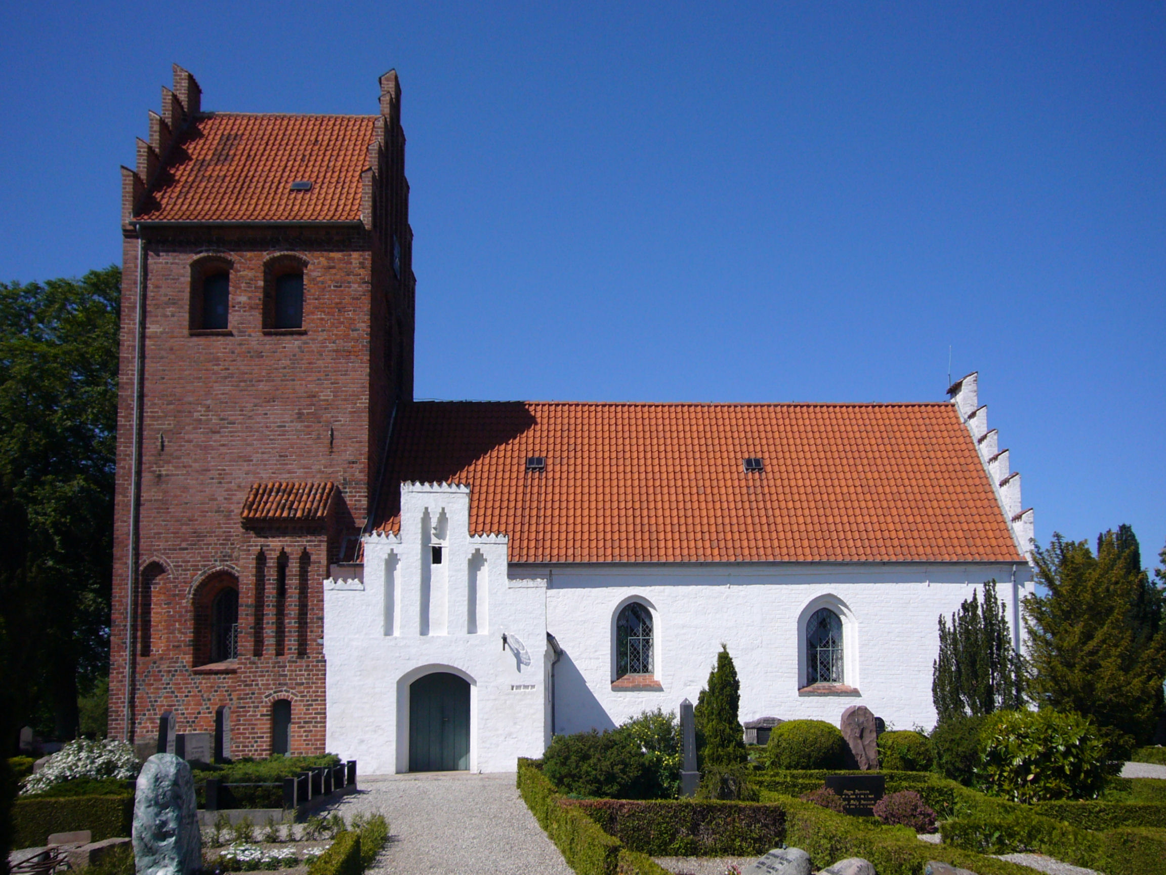 Torslunde Kirke, Ishøj, Denmark. Exterior.